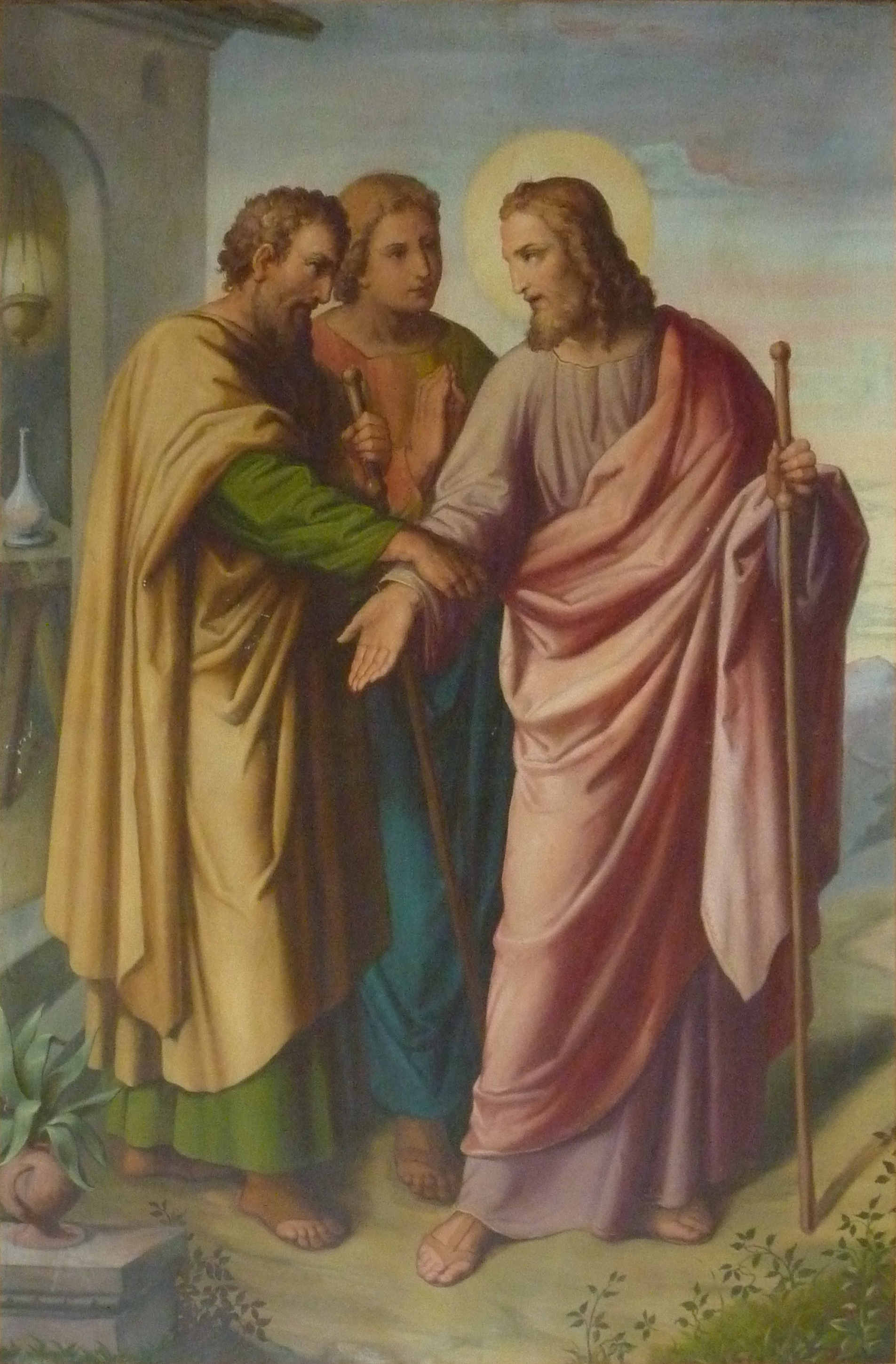 Pfarrkirche hl. Florian, Hanfthal, Laa an der Thaya, Niederösterreich - Gemälde Emmausjünger (unter der Orgelempore)